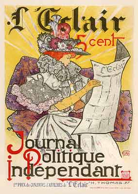 Affiche du journal l'Eclair